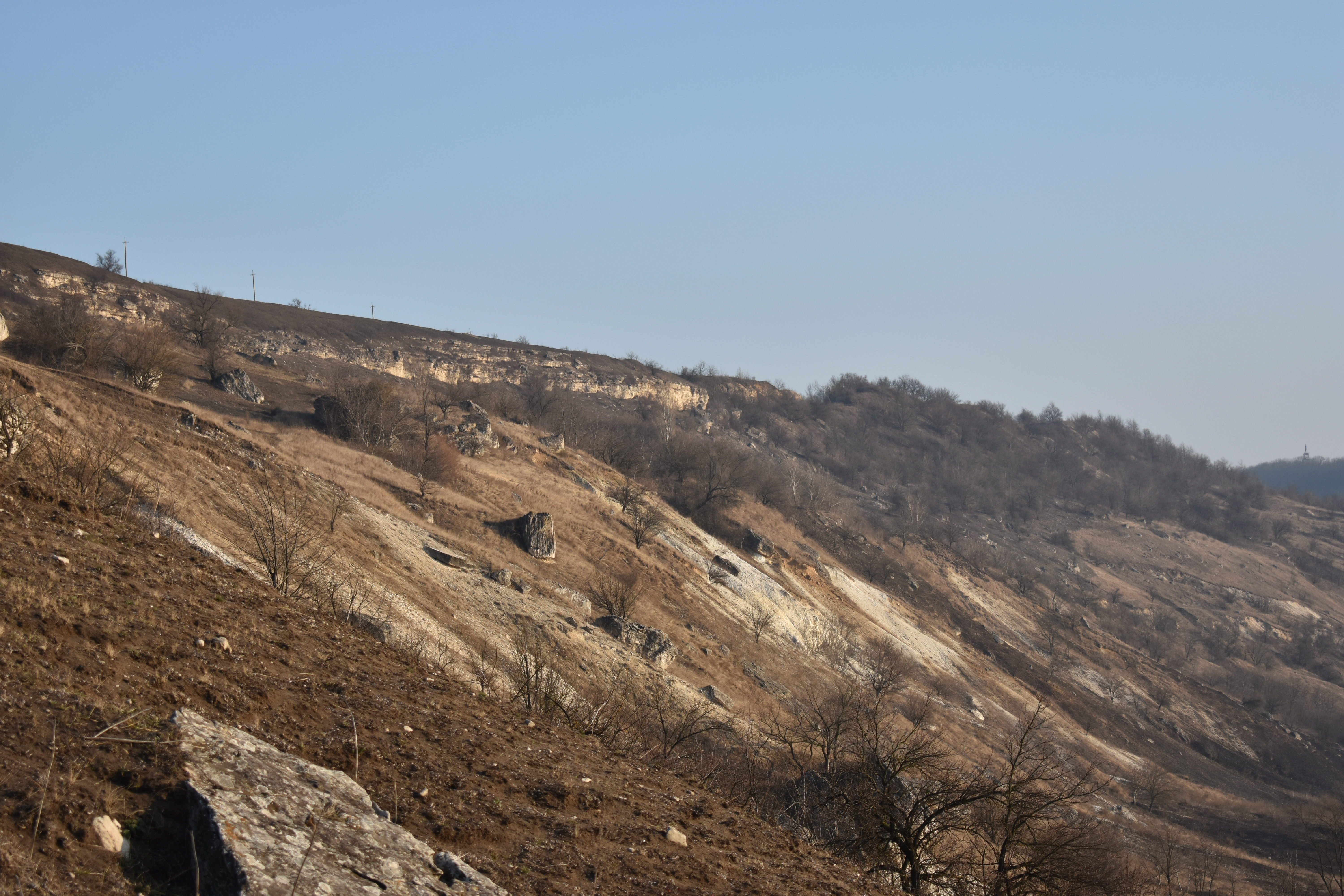 Схили регіонального ландшафтного парку "Дністер" в околицях міста Могилів-Подільський